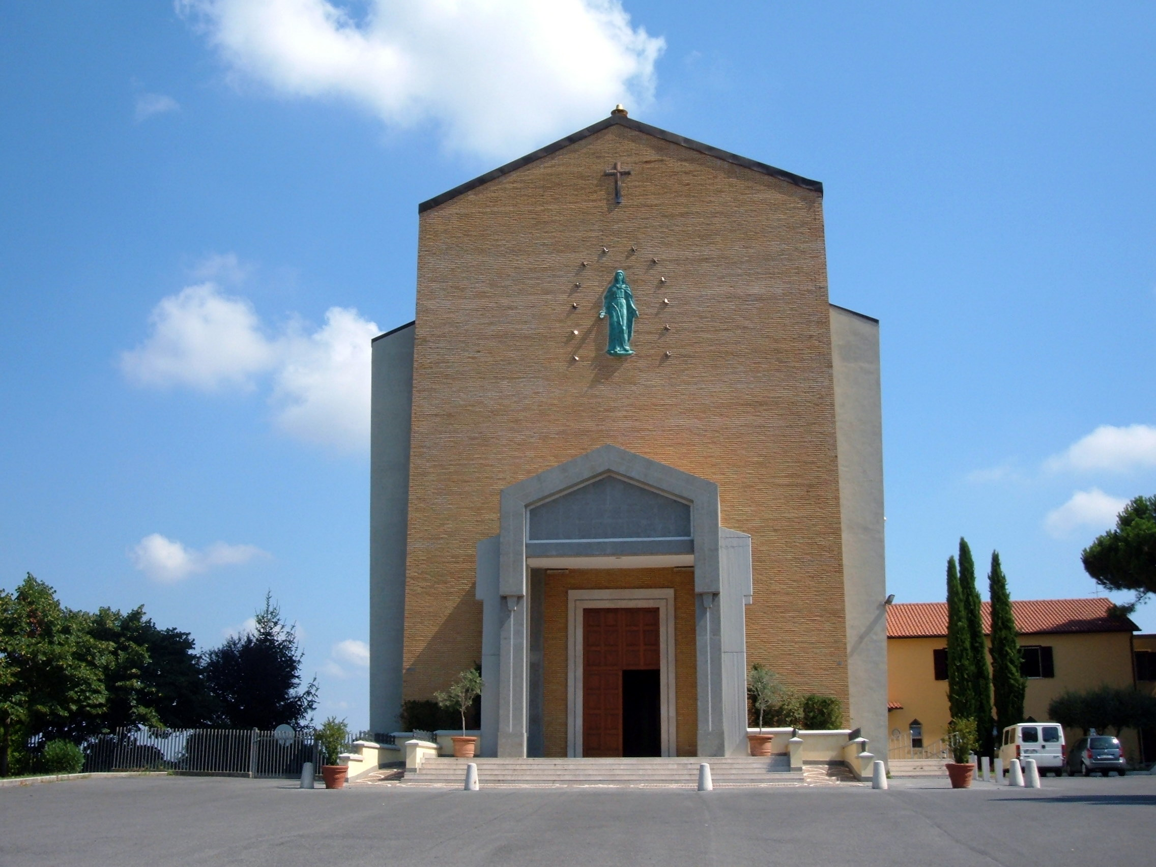 Chiesa parrocchiale della Beata Vergine Maria Immacolata, a Roma, in via Cassia, nella zona La Giustiniana (Z.LIV)